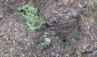 Melaphyr (Basalt) - Šalková, Banská Bystrica, Slovakia.